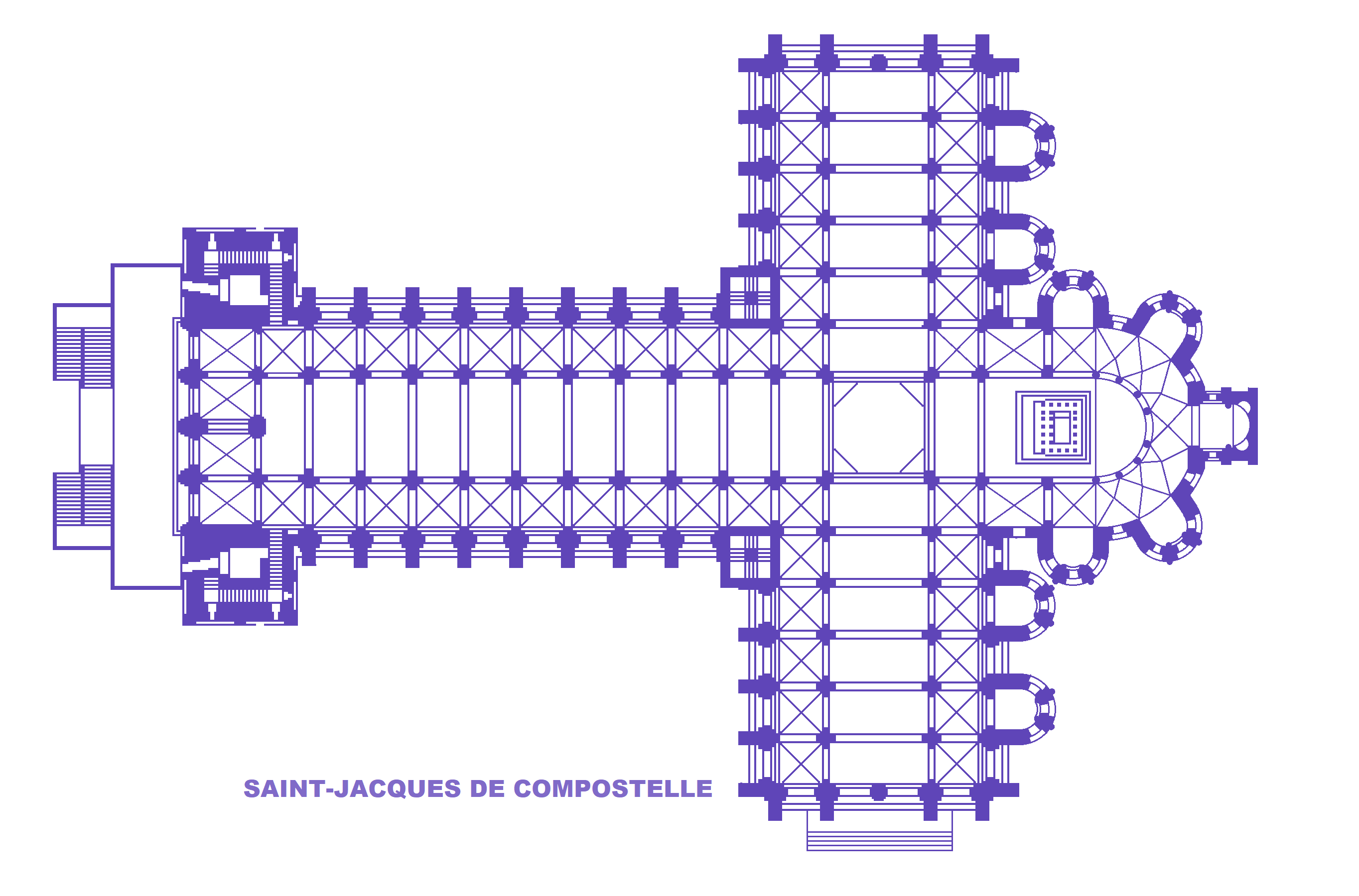 Cathédrale Saint-Jacques de Compostelle (image Commons modifiée)